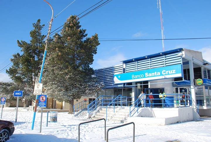 Banco santa cruz Puerto San Julian